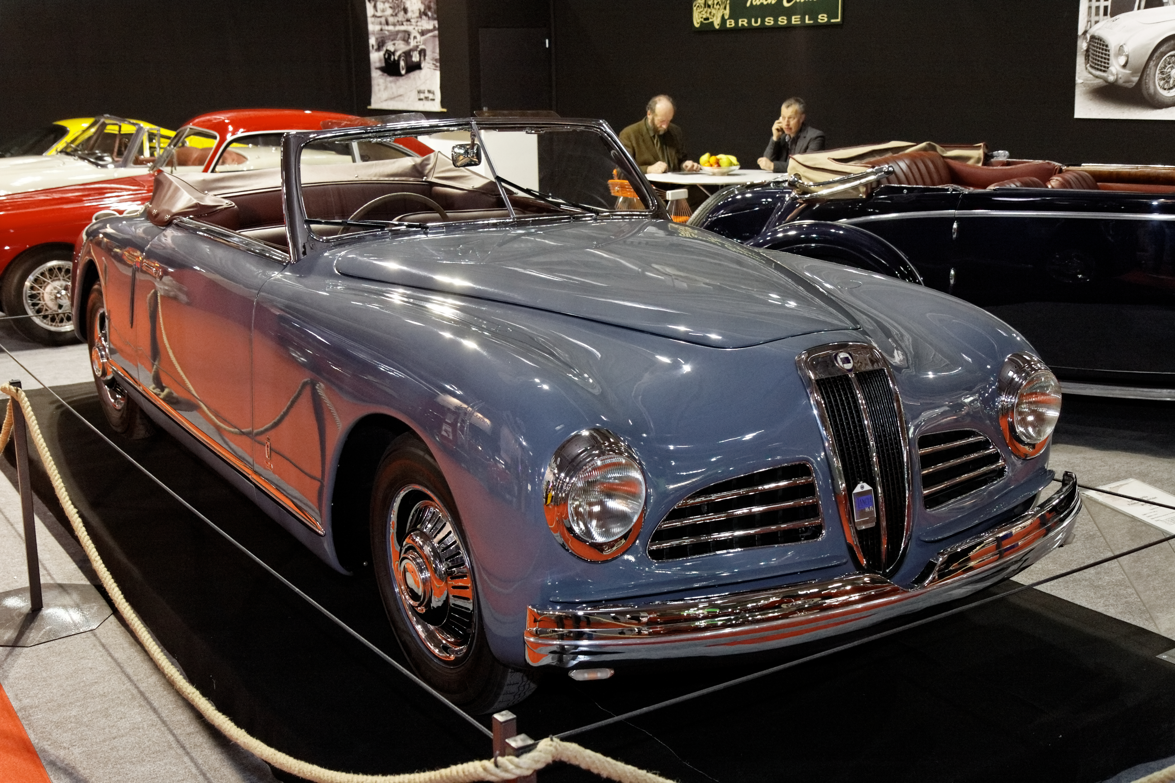 Lancia Aprilia Pininfarina Cabriolet prototype